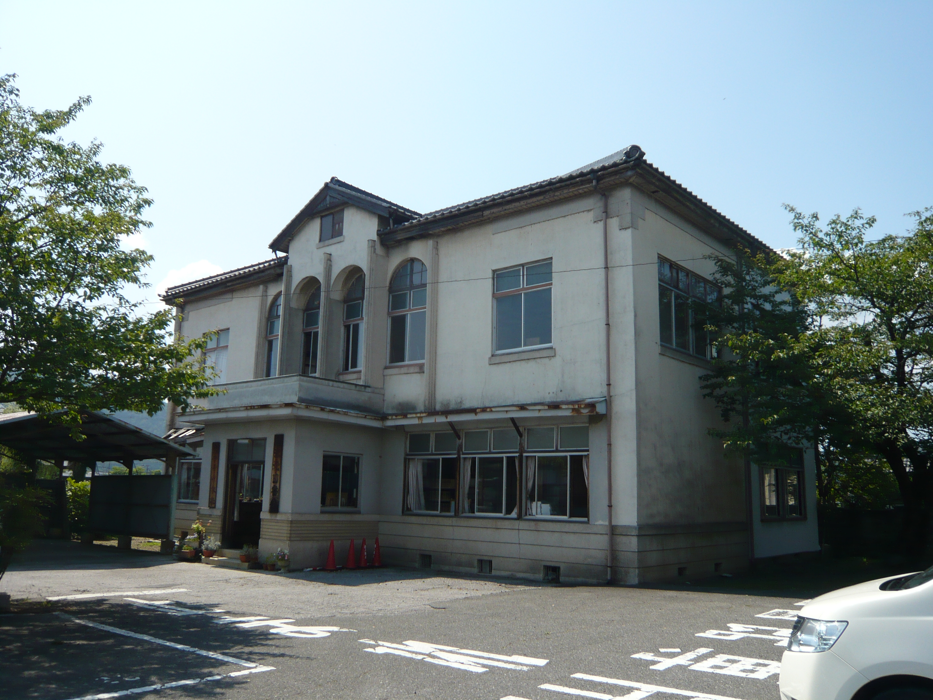 財団法人立の江北図書館（滋賀県長浜市木之本町）